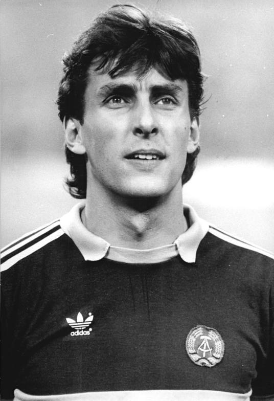 ADN-ZB-Kluge-11.8.86-kb- Berlin: "Fußballer des Jahres"- Der 27jährige Nationalmannschafts-Kapitän Rene Müller (1. FC Lok Leipzig) ging aus der Wahl zum "Fußballer des Jahres" als Sieger hervor. In der zum 24. Mal durchgeführten Fuwo-Umfrage unter 50 Sportredaktionen der DDR-Massenmedien erhielt der 25fache Auswahlspieler vom Vizemeister und Pokalsieger 1. FC Lok Leipzig mit 421 die meisten Stimmen. Mit Rene Müller erhält zum siebenten Mal ein Torhüter den "Silbernen Fußballschuh" der Fuwo.